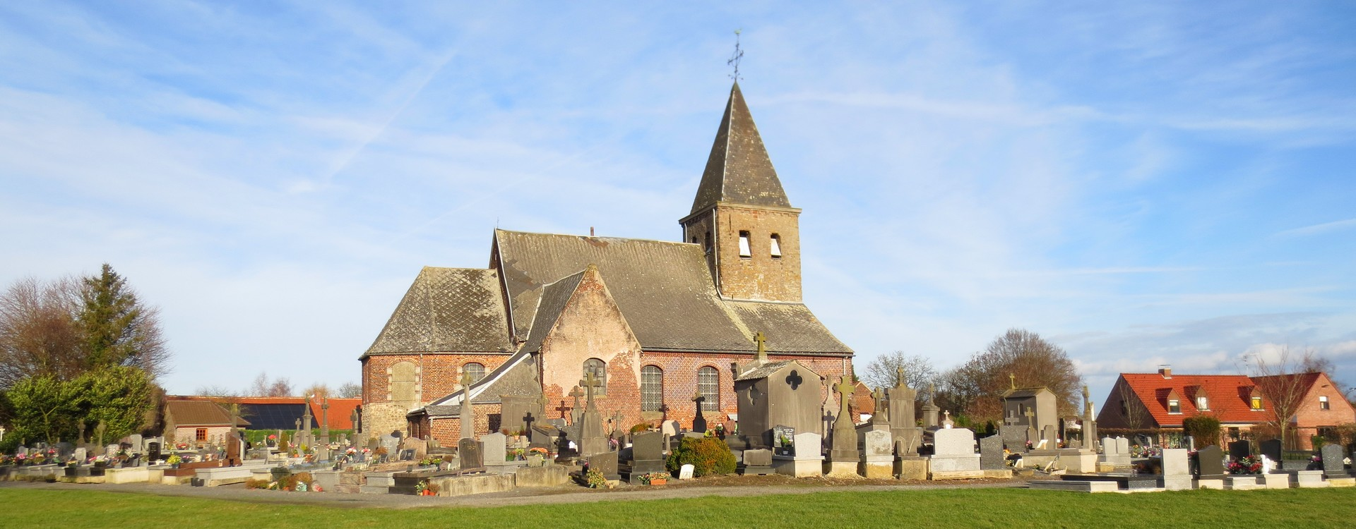 Aix-lez-Orchies